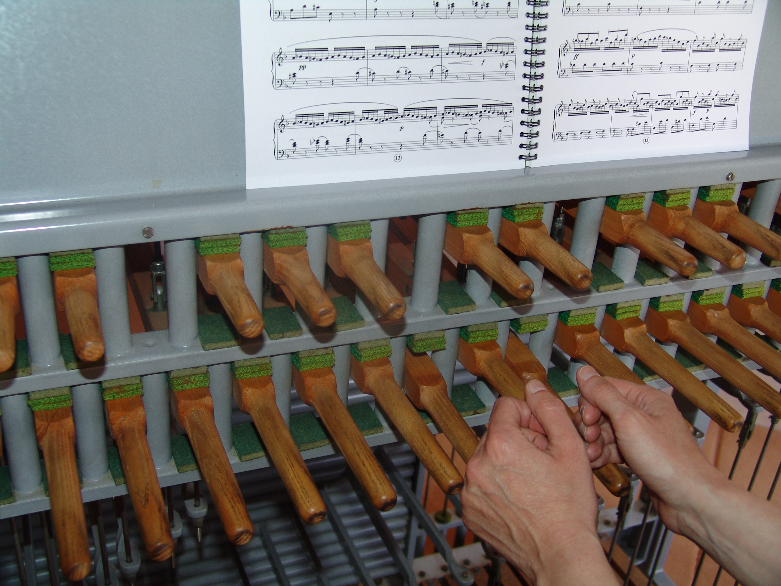 Carilló del Palau de la Generalitat que té 49 campanes i un pes total de 4.898 quilos